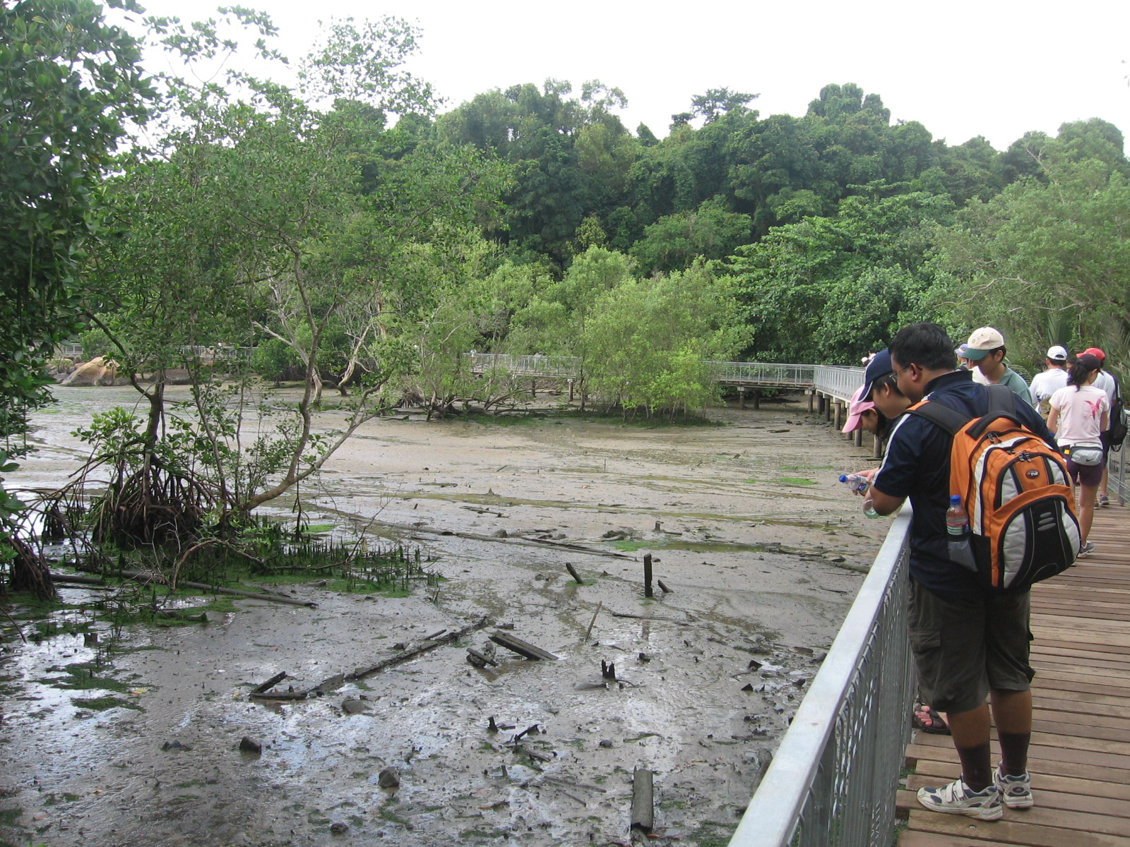 Chek Jawa, Pulau Ubin, Singapore